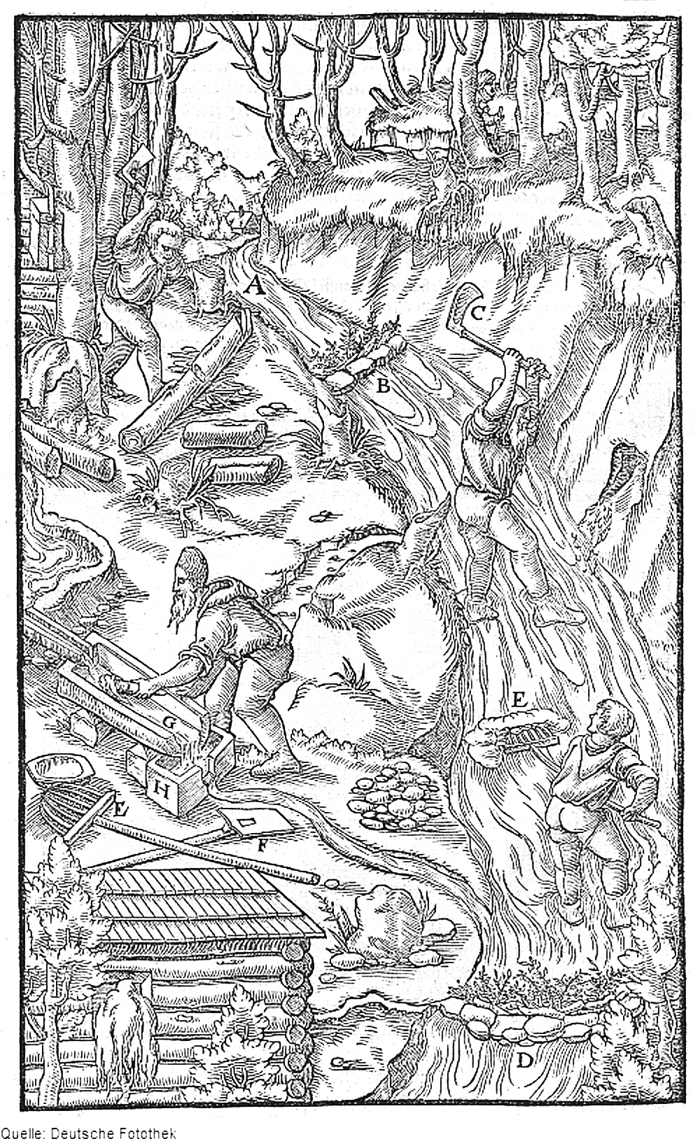 Original image description from the Deutsche Fotothek Bergwerk & Bergbau & Hüttenwesen & Verhüttung & Verseifung & Zinnverseifung & Lautertrog